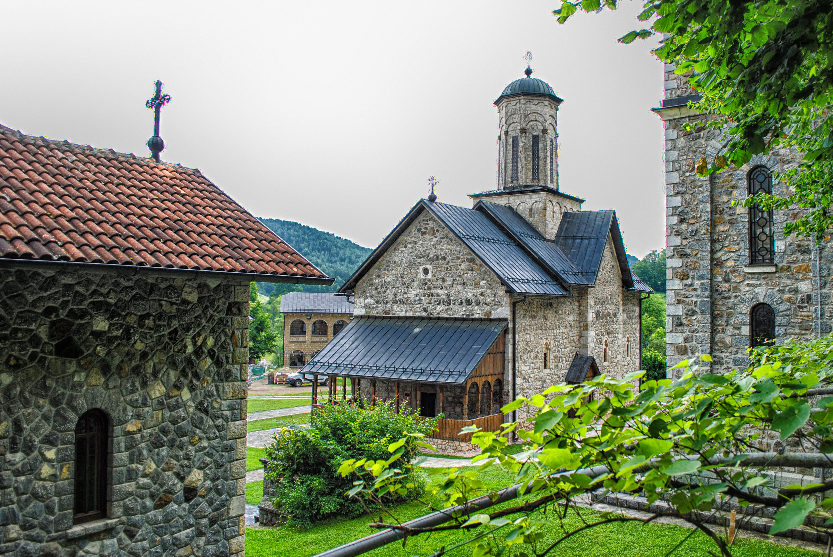 This image was uploaded as part of Trace of Soul 2019.